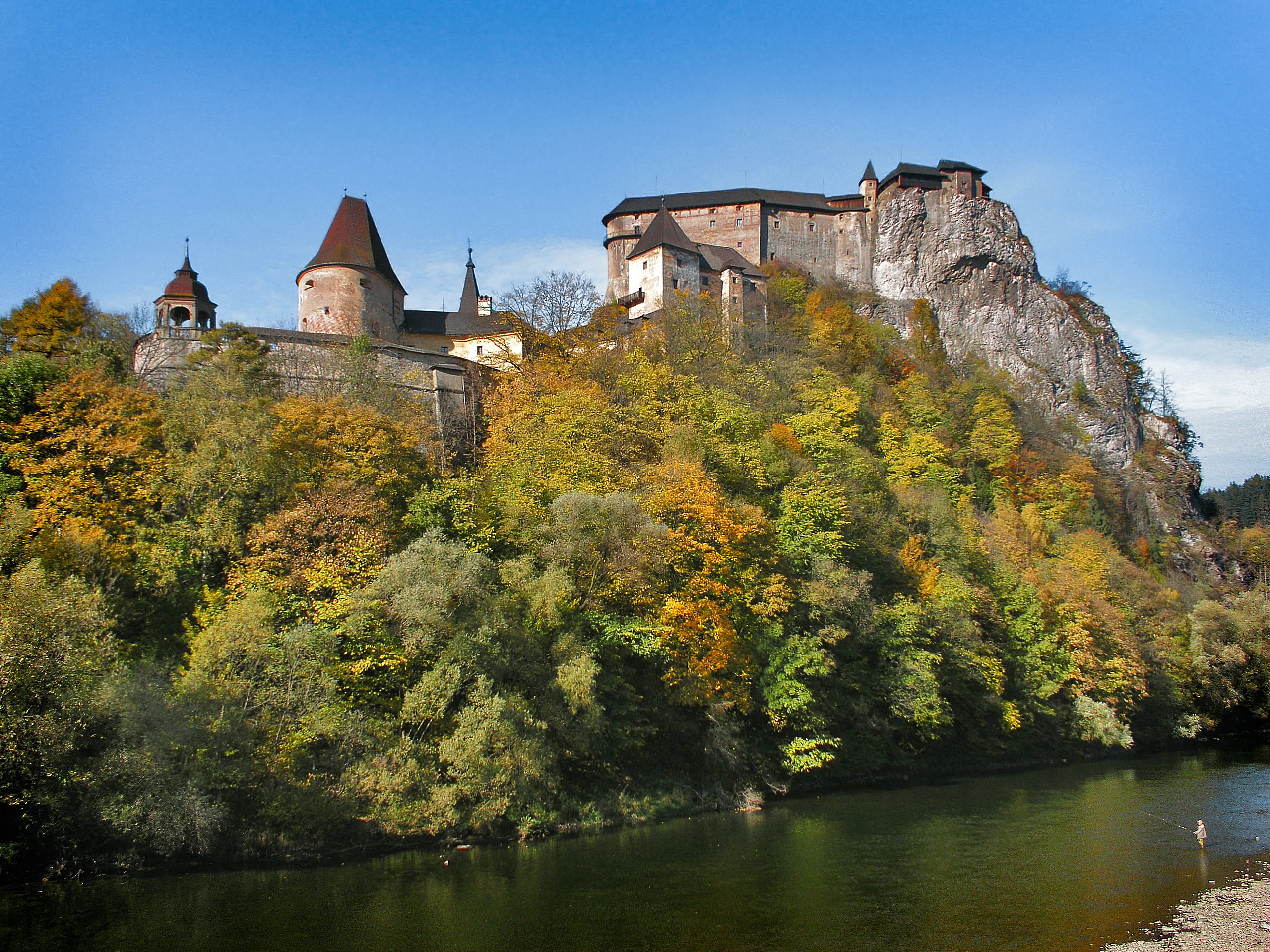 Zmiana rozmiaru 1920x2560 - 18:50 (CEST), 20 maja 2006 Jurbox